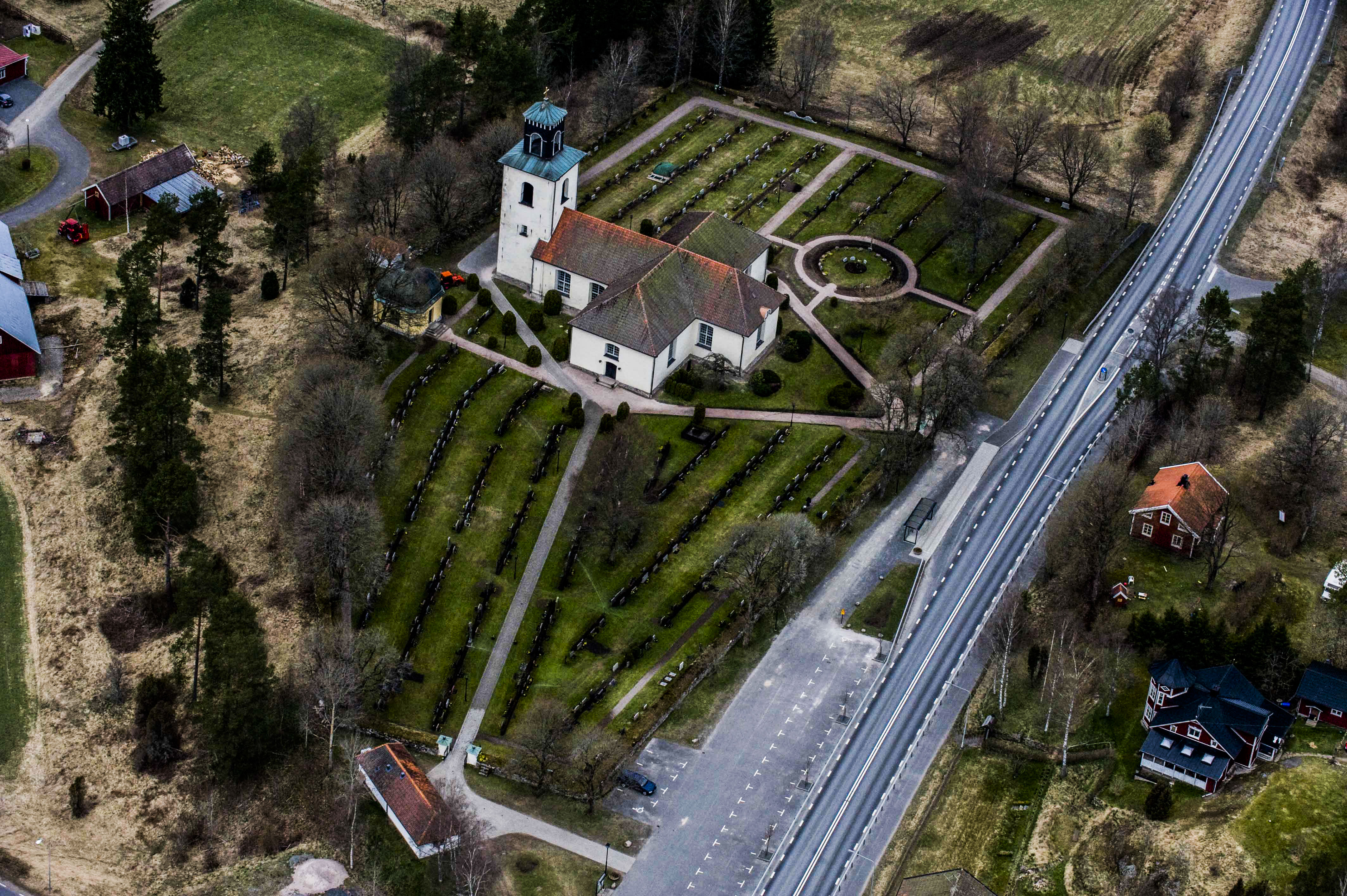 Svenarums ka